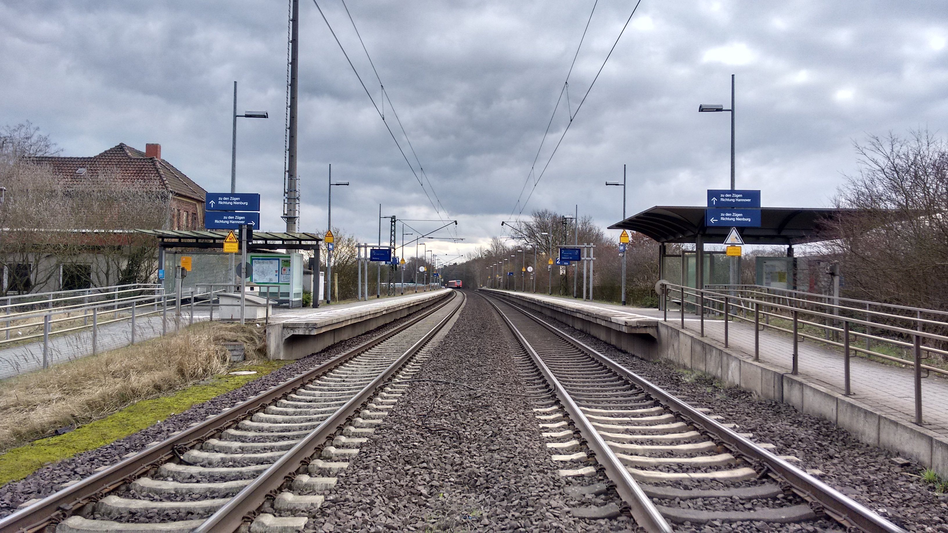 Bahnhof Eilvese, Blick auf die Strecke Richtung Hannover